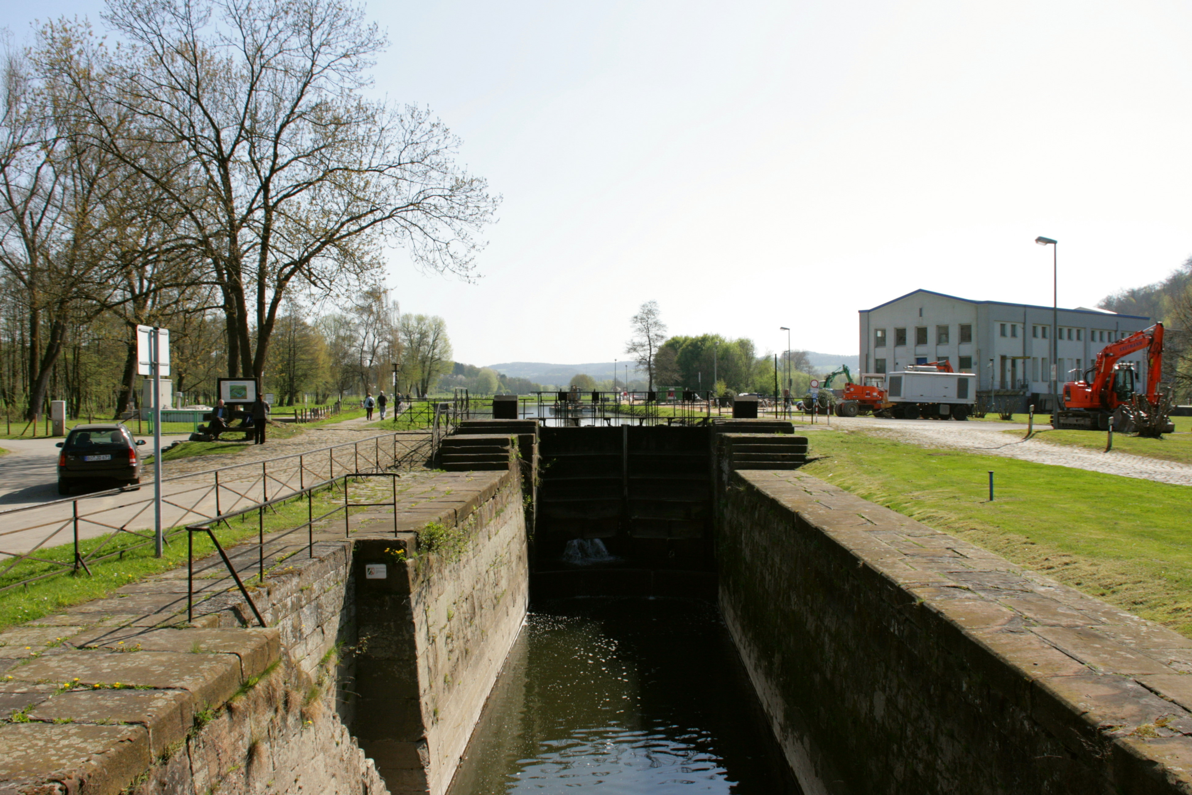 Schleuse Blankenstein in Bochum-Stiepel